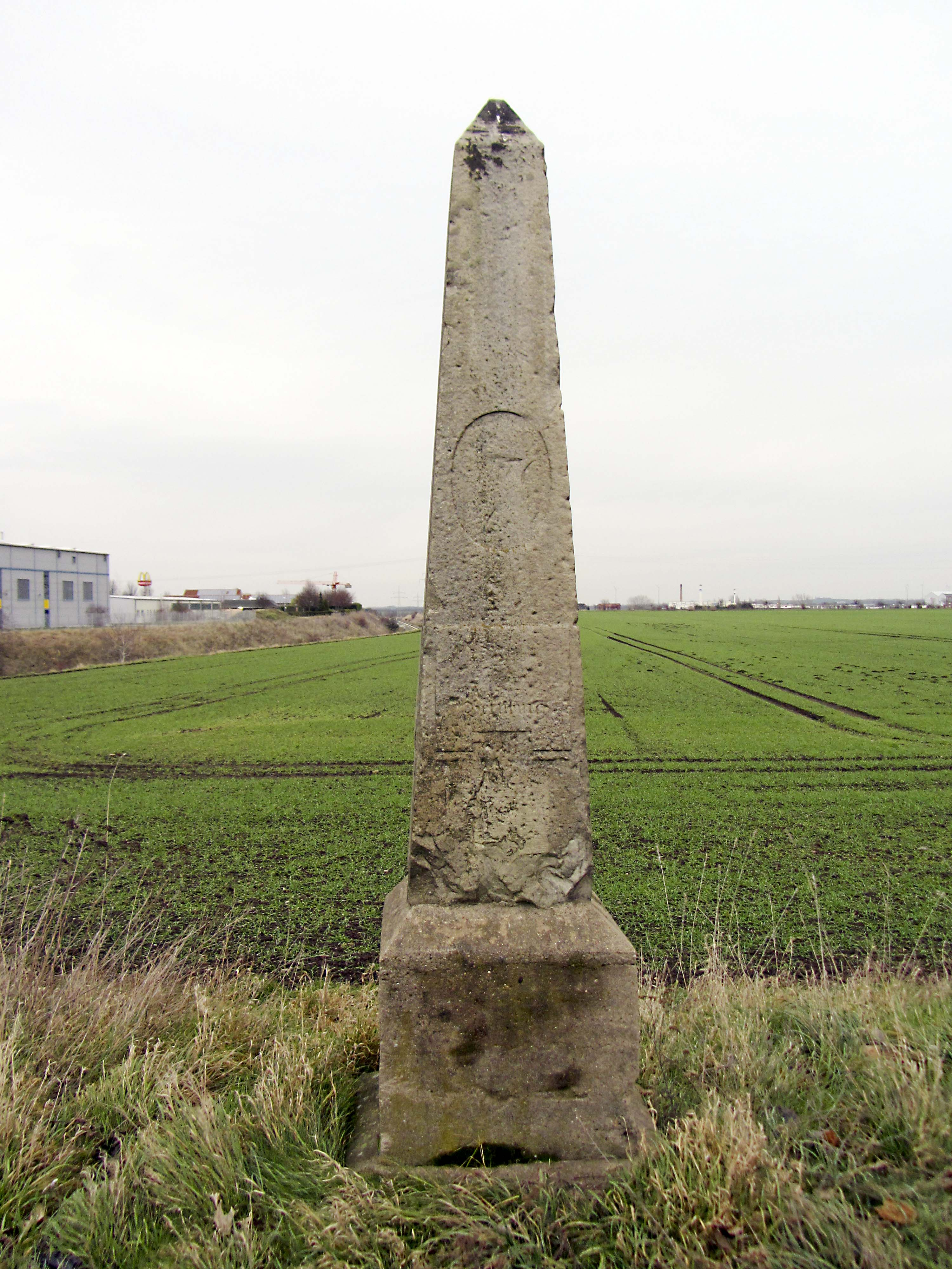 Preußischer Ganzmeilenobelisk, Hallesche Landstraße Brücke an der Salzbahn (L 50). Der Sockel ist neu, aus Beton und zu klein.